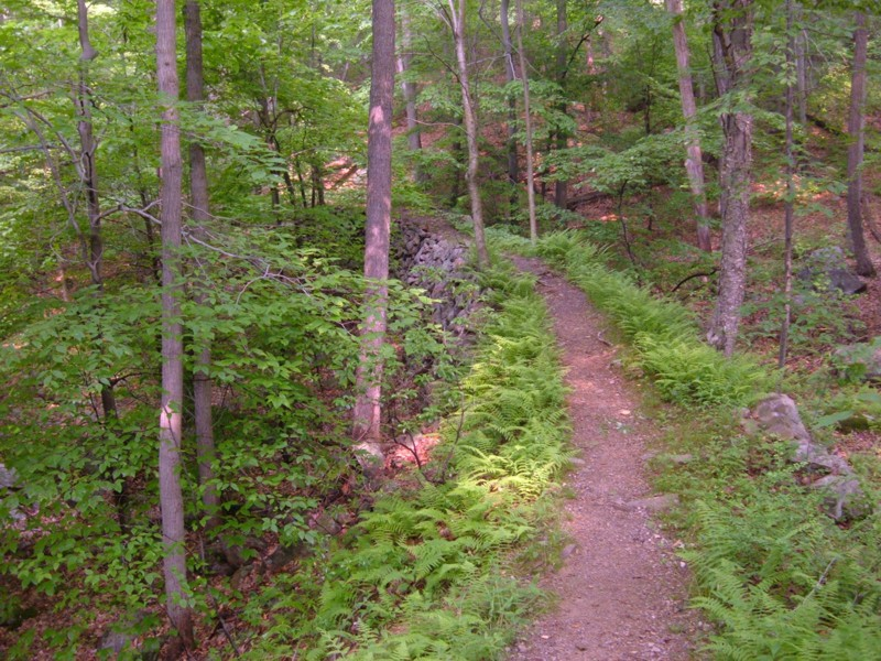 AT auf dem ehemaligen Damm einer Lorenbahn im Fahnestock State Park, New York; Foto: Matthias Manske